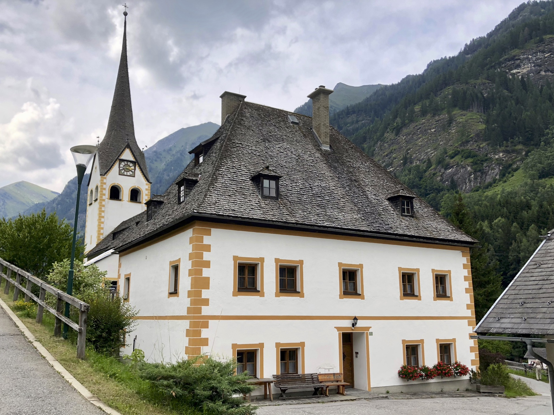 Pfarrhof Muhr